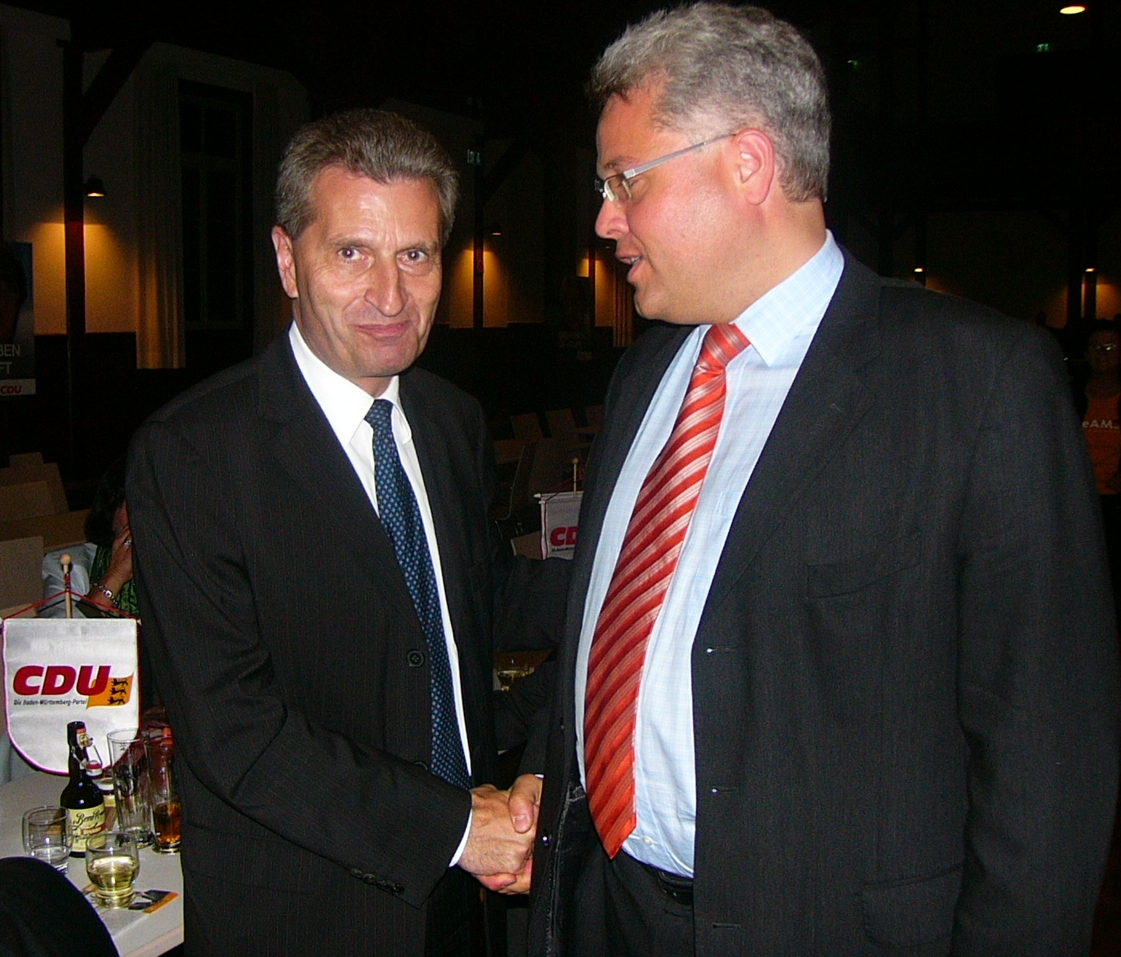 Cai-Ullrich Fark mit Baden-Württembergs Ministerpräsidenten Günther Oettinger auf einer Wahlkampfveranstaltung im September 2009 in der Gigelberghalle in Biberach/Riß